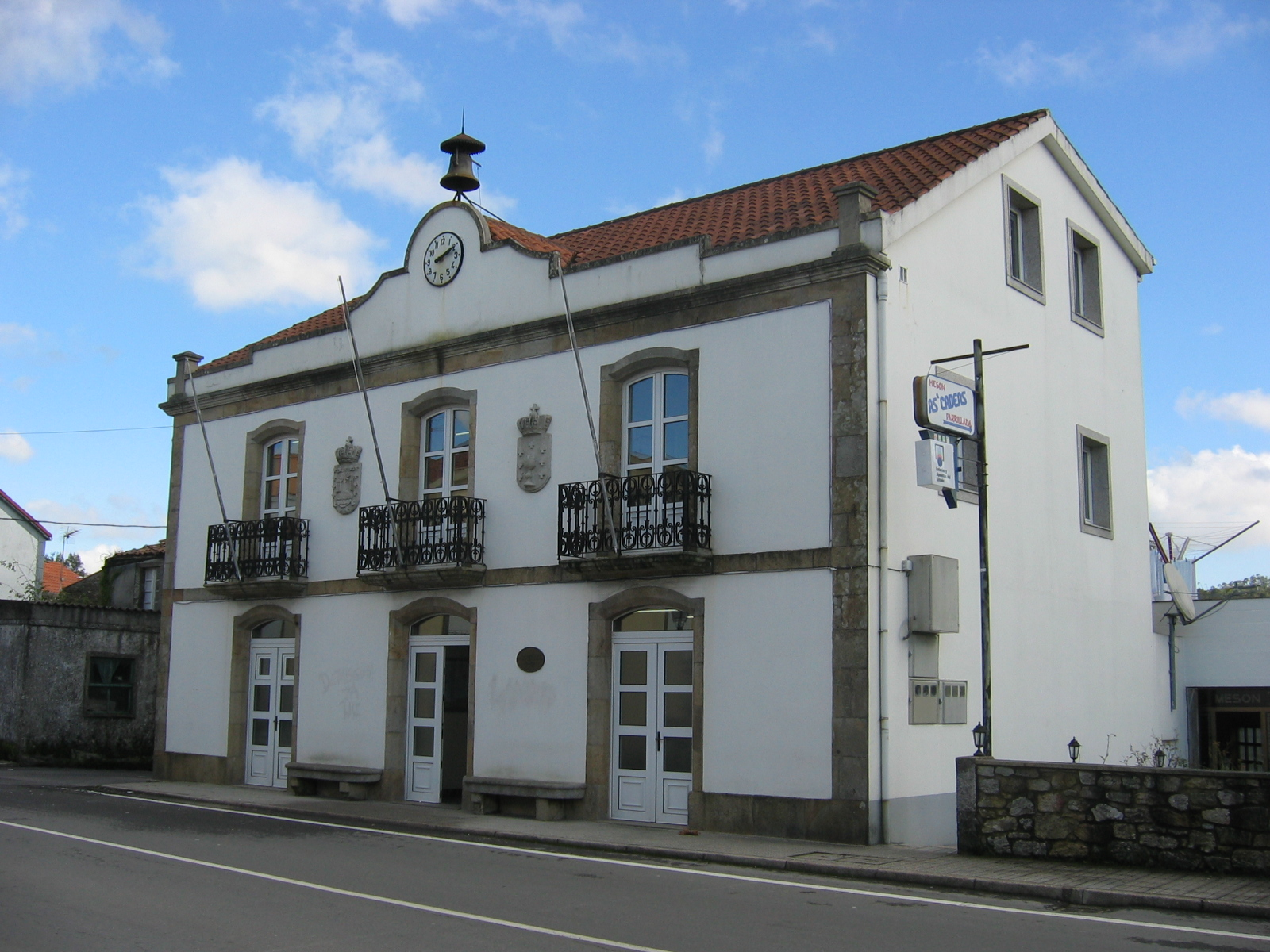 Casa do Concello da Baña.